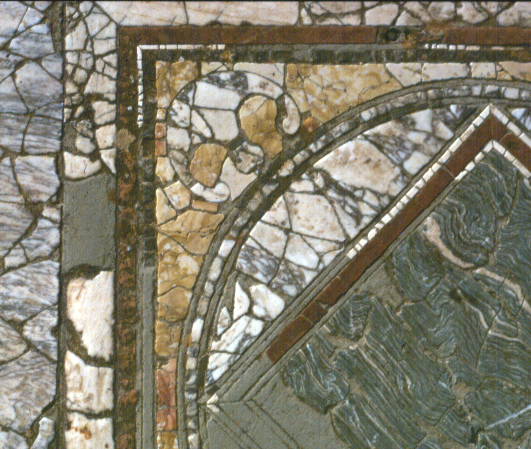 Libia, Cirene (sito archeologico), Insula di Giasone Magno, Triclinio estivo, pavimentazione in opus sectile, particolare